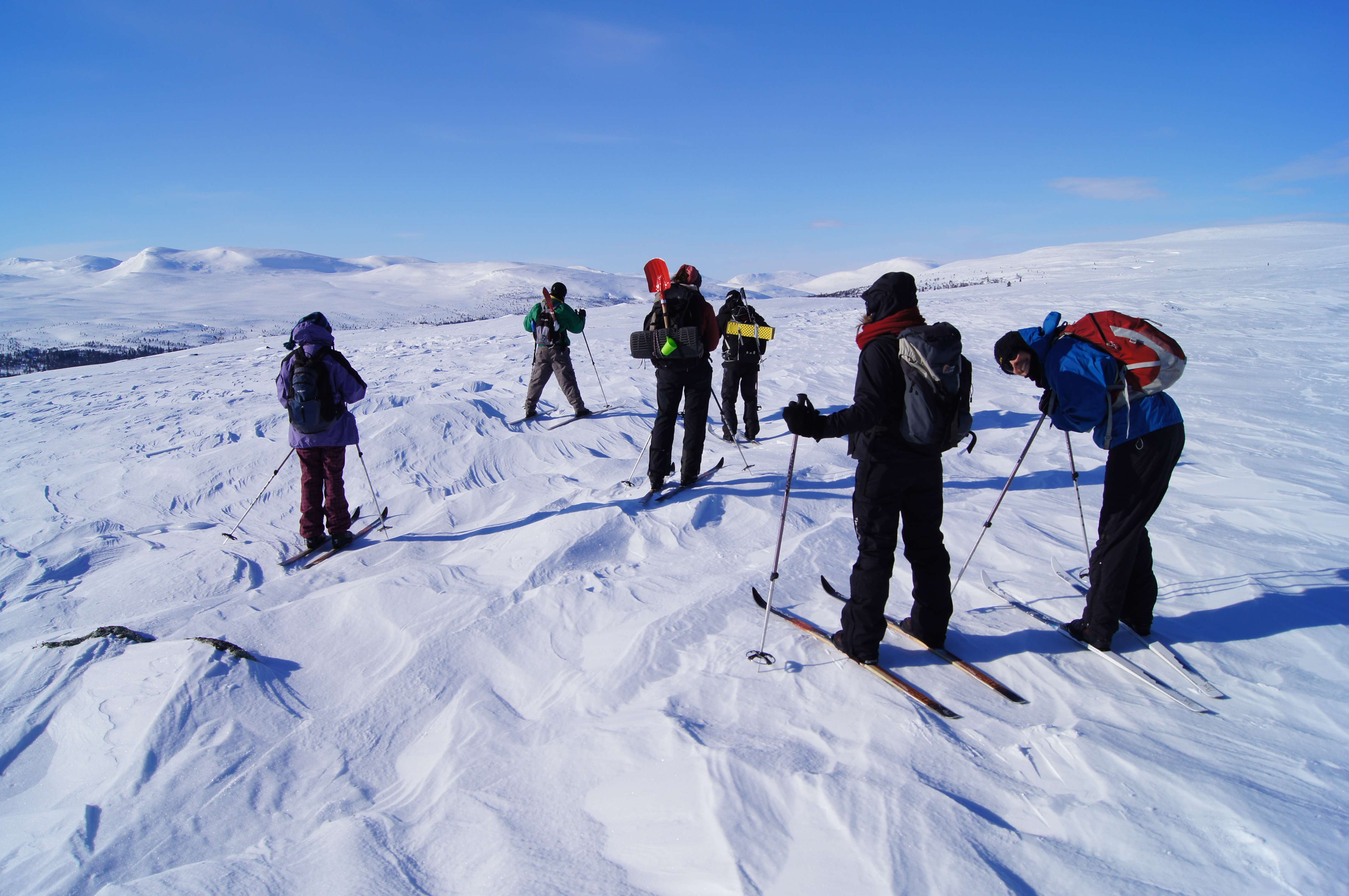 skupina, pohod, zima, sneg, smuči, oprema